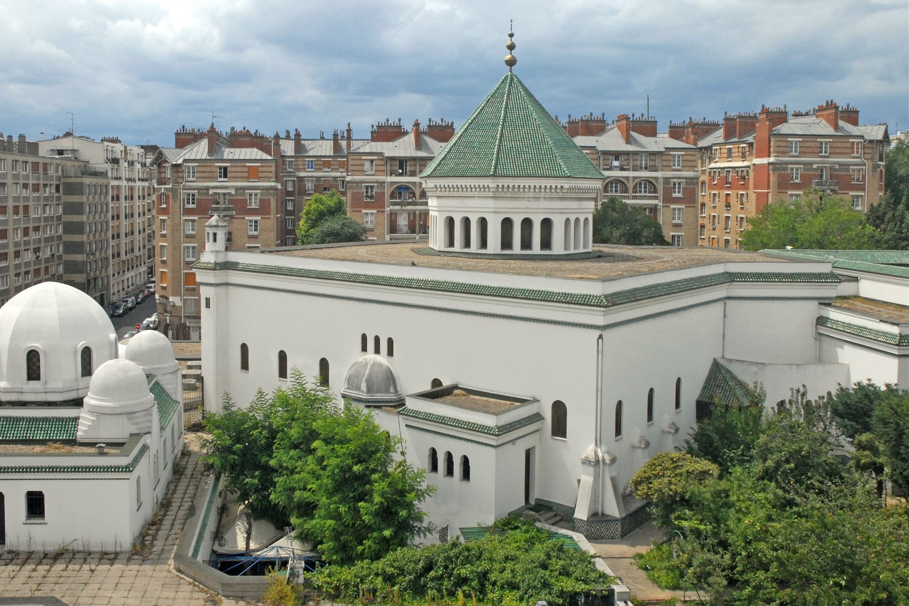 La grande mosquée de Paris est de style hispanomauresque. Son minaret se dresse à 33 mètres de hauteur. Elle a été construite au lendemain de la première guerre mondiale (1922 - 1926). Le minaret est conforme aux normes de l’Ecole malékite. C’est une tour carrée, fleurie de faïence turquoises (à droite). La décision de construire la Grande Mosquée de Paris (première mosquée construite en France) est prise au lendemain de la bataille de Verdun en 1916 qui fit 28 000 morts musulmans, et pour rendre hommage à près de 70 000 soldats musulmans morts (38 000 du Maghreb dont 23 000 Algériens) pour la France durant la Première Guerre mondiale (Wikipedia)